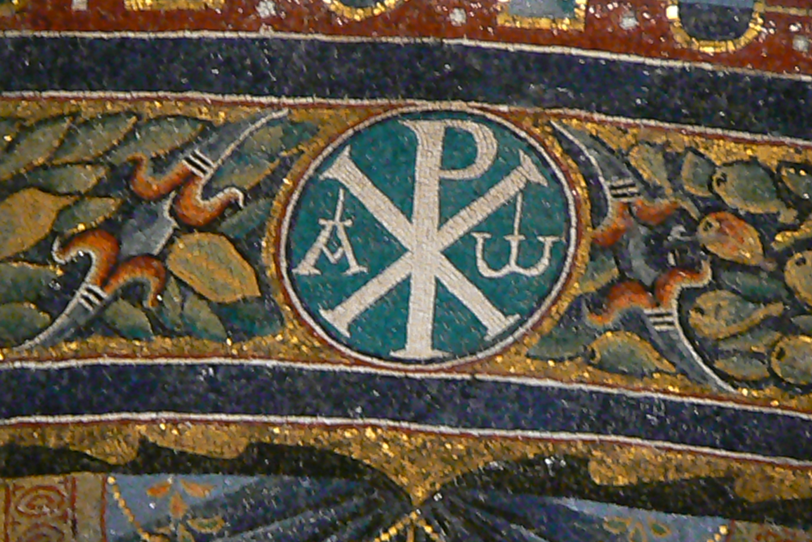 Roma, Basilica di San Clemente, mosaico, dettaglio